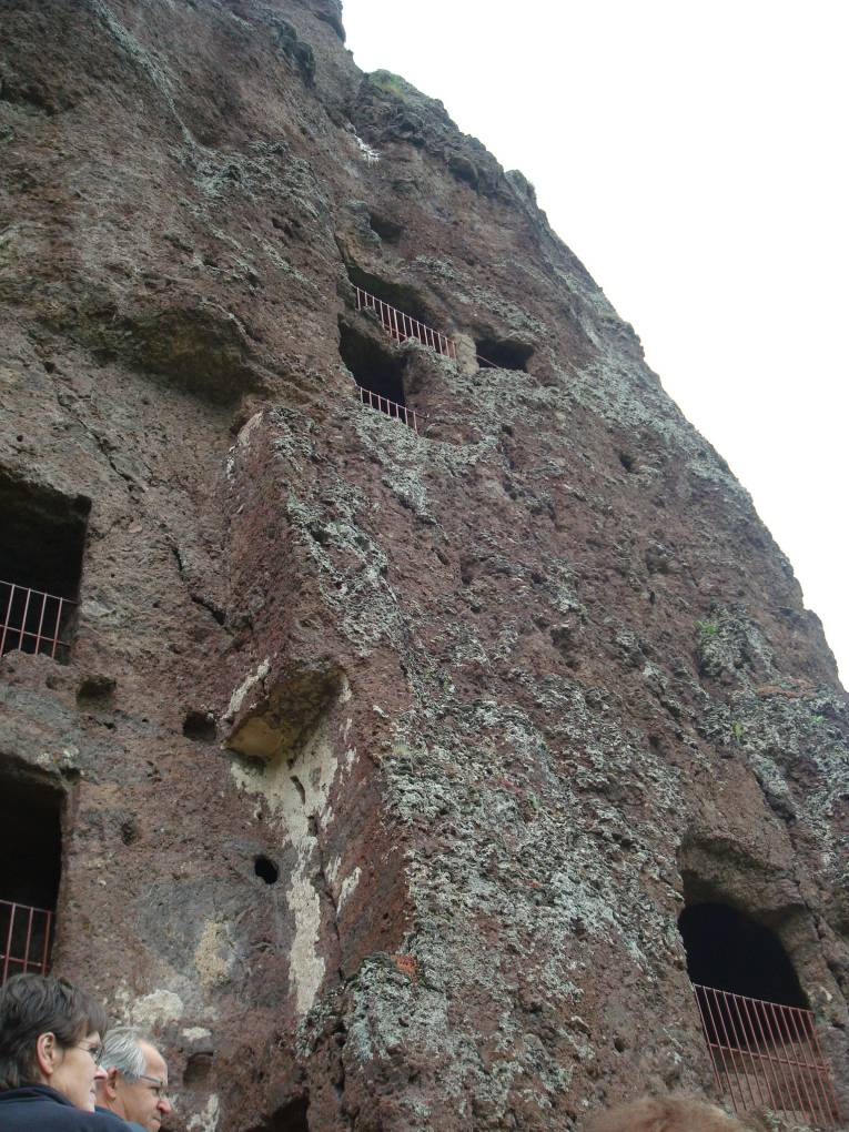 Site des grottes ytroglodytiques de Jonas en Auvergne, façade du château du seigneur.